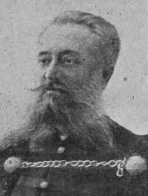 Władysław Czaykowski (-1907)